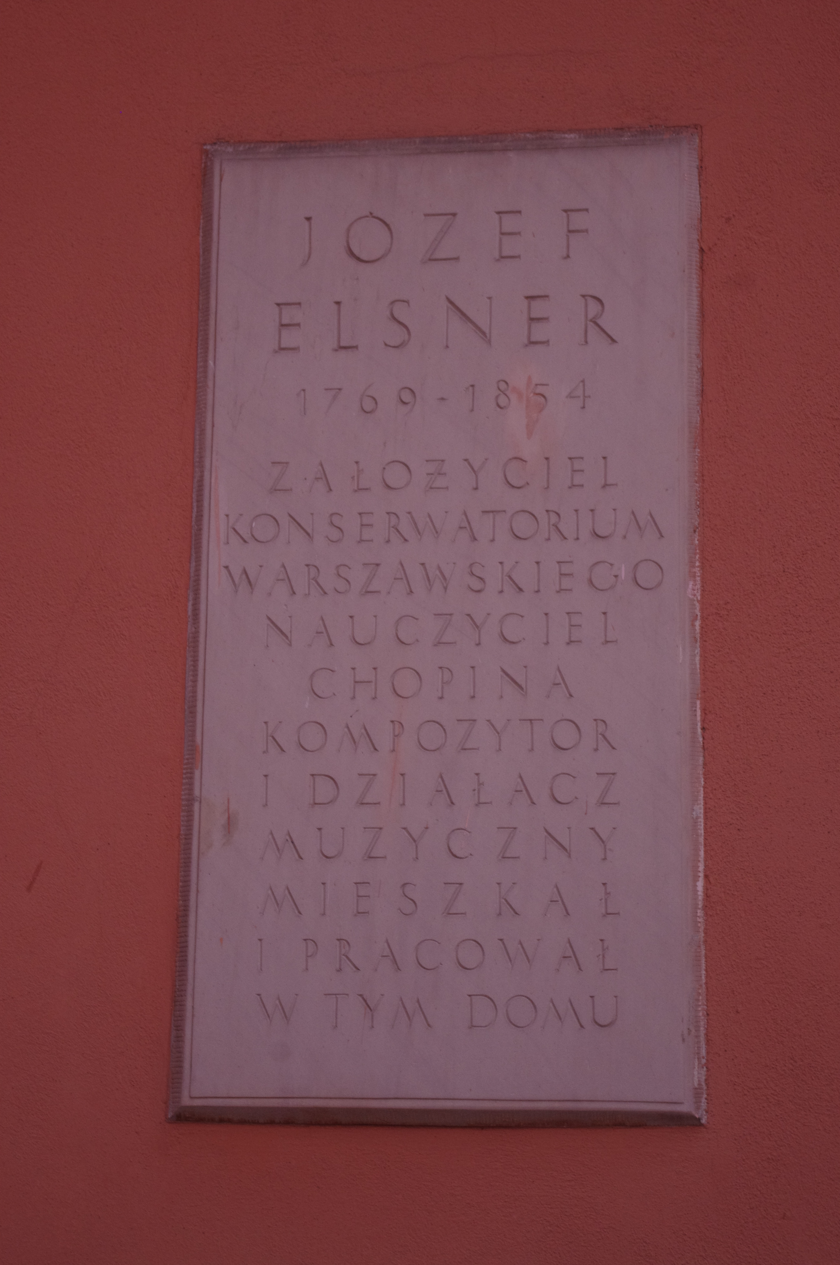 Tablica upamiętniająca Józefa Elsnera na budynku Zajazdu Dziekanka na warszawski Krakowskim Przedmieściu